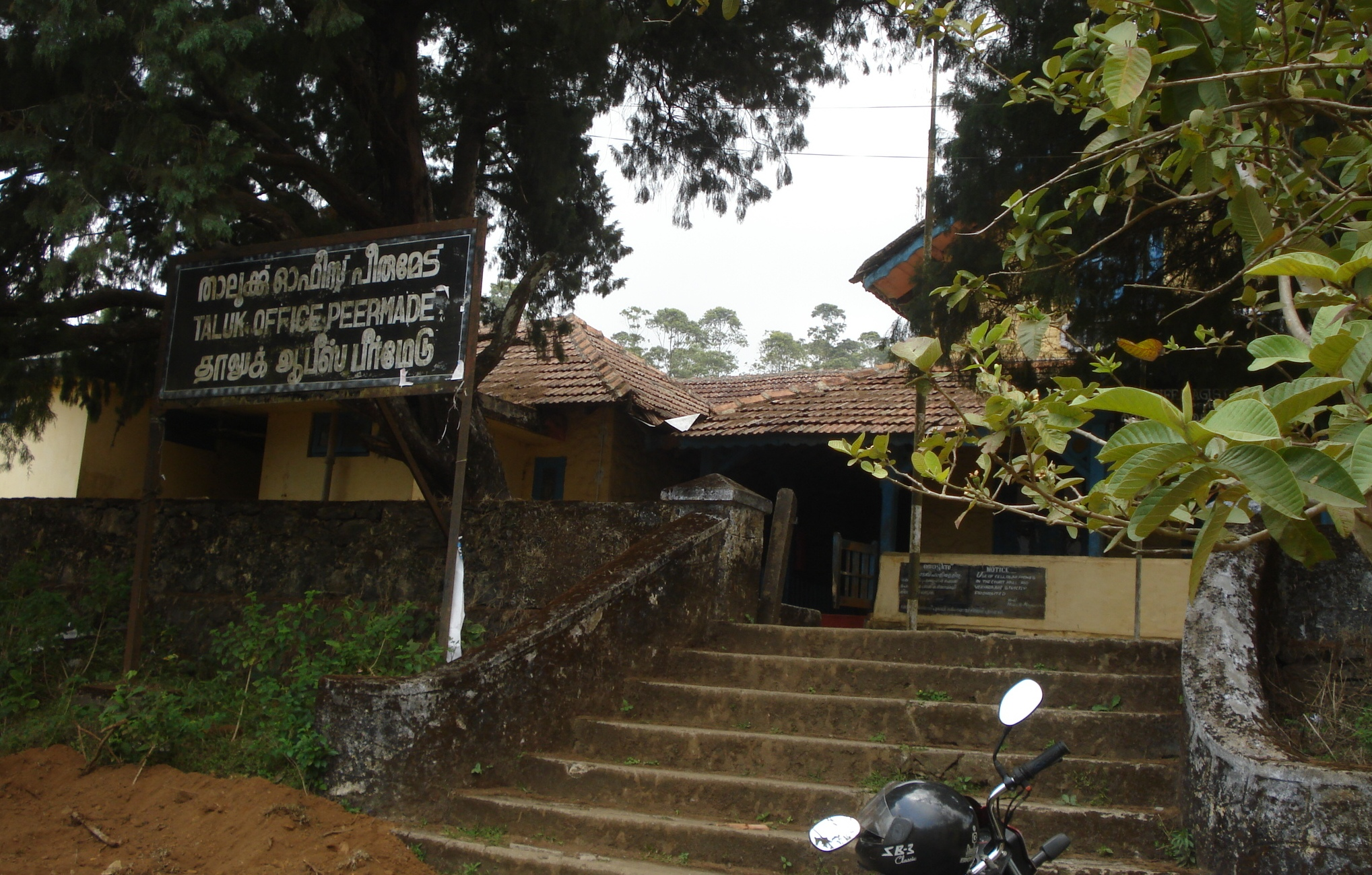 പീരുമേട് താലൂക്ക് ഓഫീസ് കെട്ടിടം--ഈ കെട്ടിടത്തിൽ താലൂക്ക് ഓഫീസിനു പുറമേ മജിസ്റ്റ്രേറ്റ് കോടതിയും(ചിത്രത്തിൽ മുൻ വശത്തായി കാണുന്നത്) സബ്-ട്രഷറിയും പ്രവർത്തിക്കുന്നു.